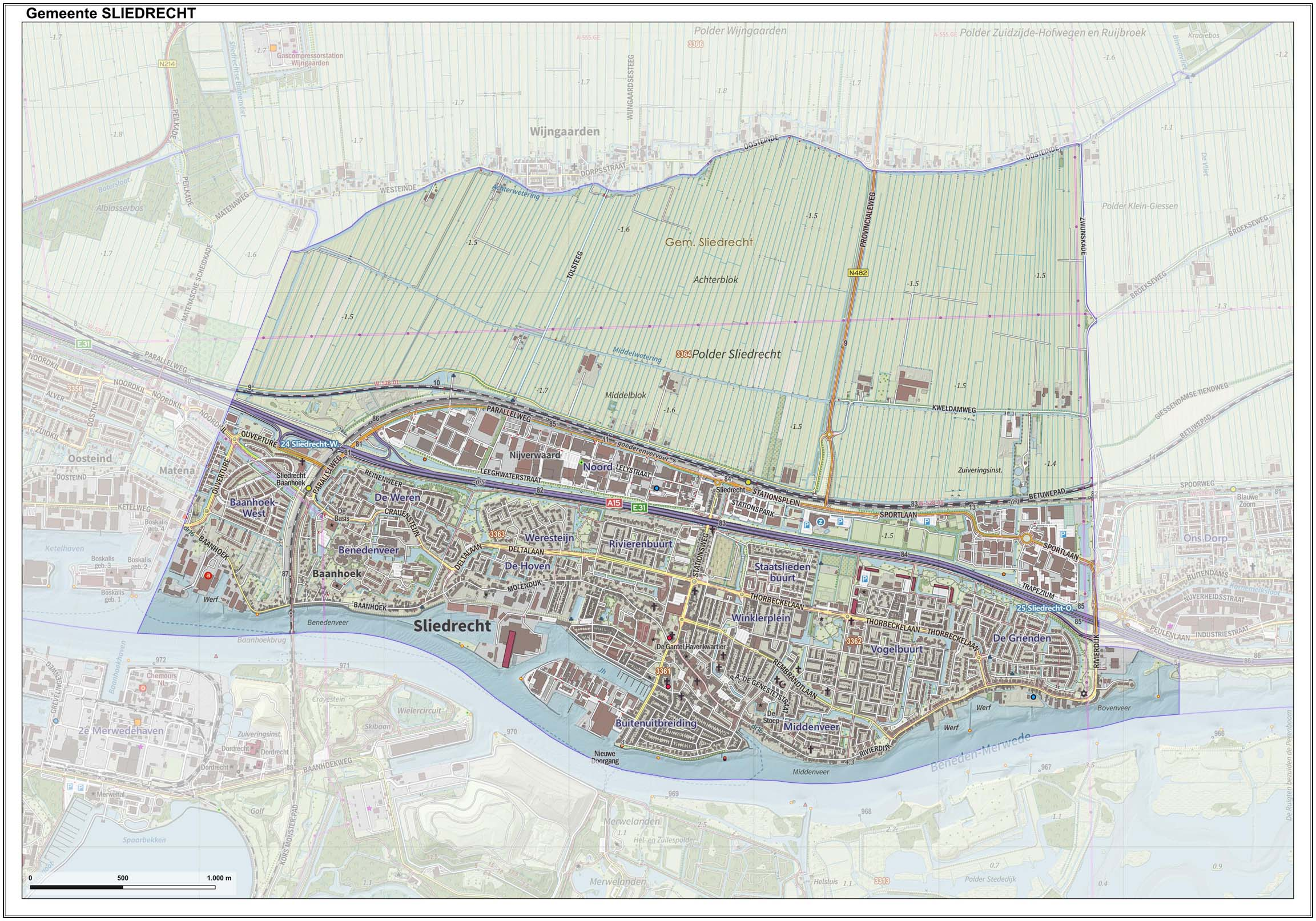 Topografische gemeentekaart. Resolutie: 400 pixels/km. Kaartbeeld samengesteld uit de open geodata van de Top10NL en Top25namen (Kadaster), Creative Commons-BY licentie. Gebouwvlakken uit open geodata BAG extract. Wegen uit de OpenStreetMap, OpenStreetMap community. Reliëfschaduw uit de Actuele Hoogtekaart AHN2. Samenstelling en kleurenschema: Jan-Willem van Aalst, met QGIS. Zie ook de Legenda.